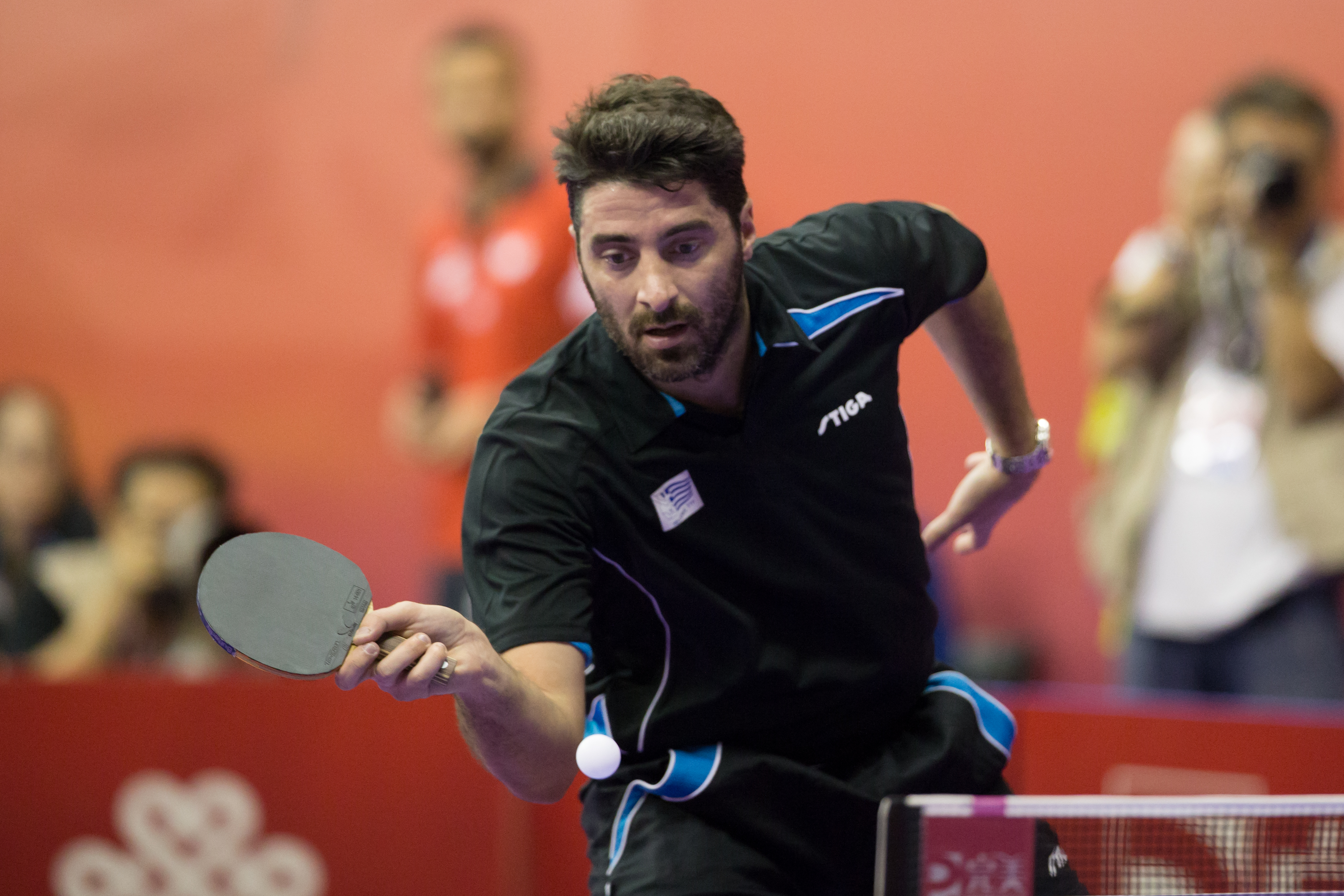 _K0K9557